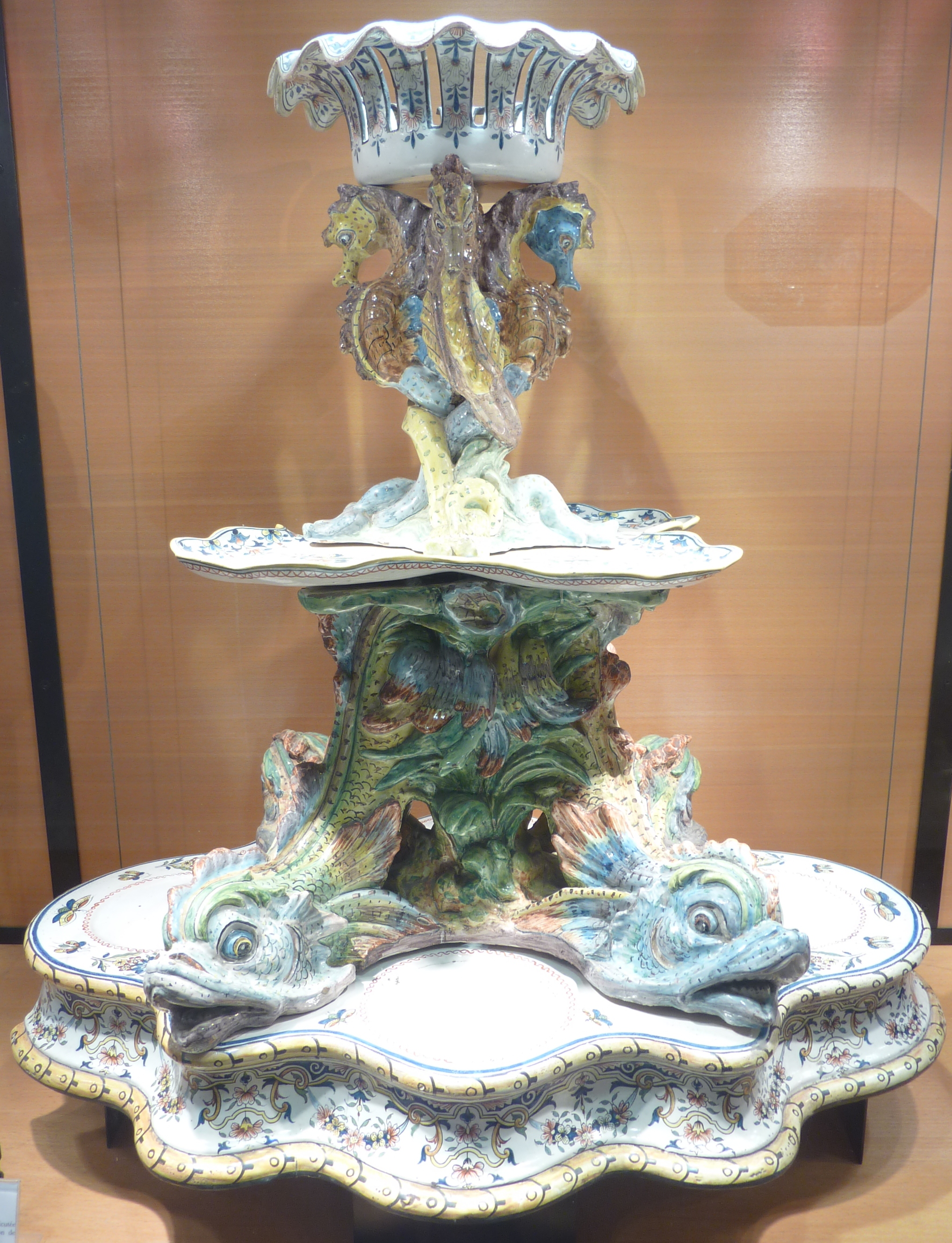 Faïence de Quimper : surtout de table aux hippocampes (créé par Henri Guiheneuc et réalisé par Masson, 1876, manufacture HB, Musée de la faïence de Quimper)